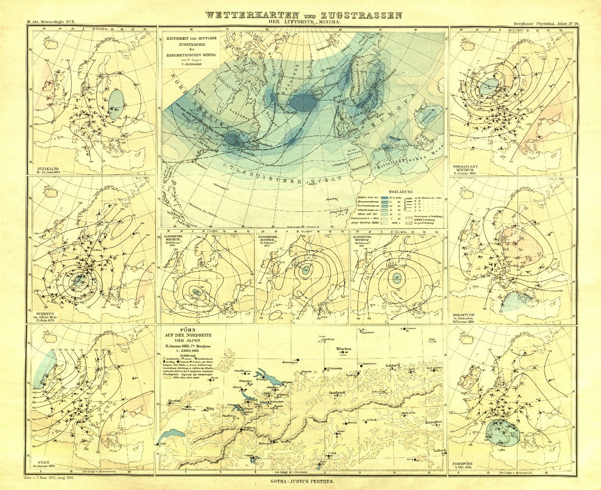 Atlas der Meteorologie, Gotha: Justus Perthes, 12 S., 12 Karten (pdf 11.3 MB) - No. X Wetterkarten und Zugstrassen der Luftdruck_Minima